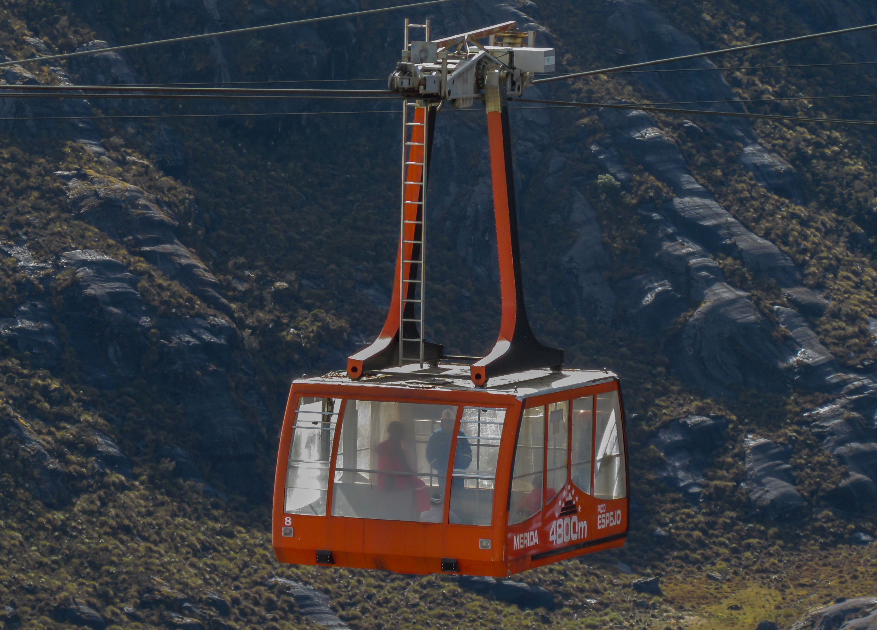 Nuevo Teleferico de Mérida Mukumbari 2015- 2.JPG